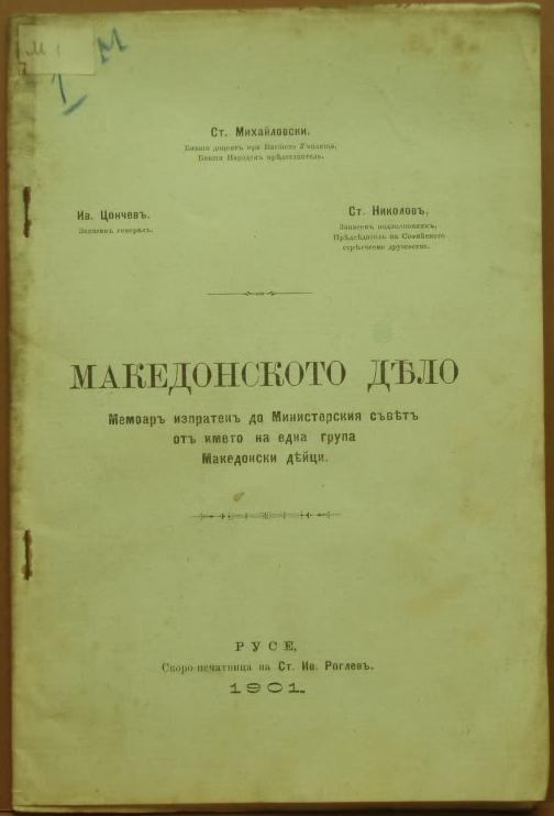 Македонското дело, мемоар на Върховния македоно-одрински комитет до българското правителство, подписан от Стоян Михайловски, Иван Цончев и Стефан Николов